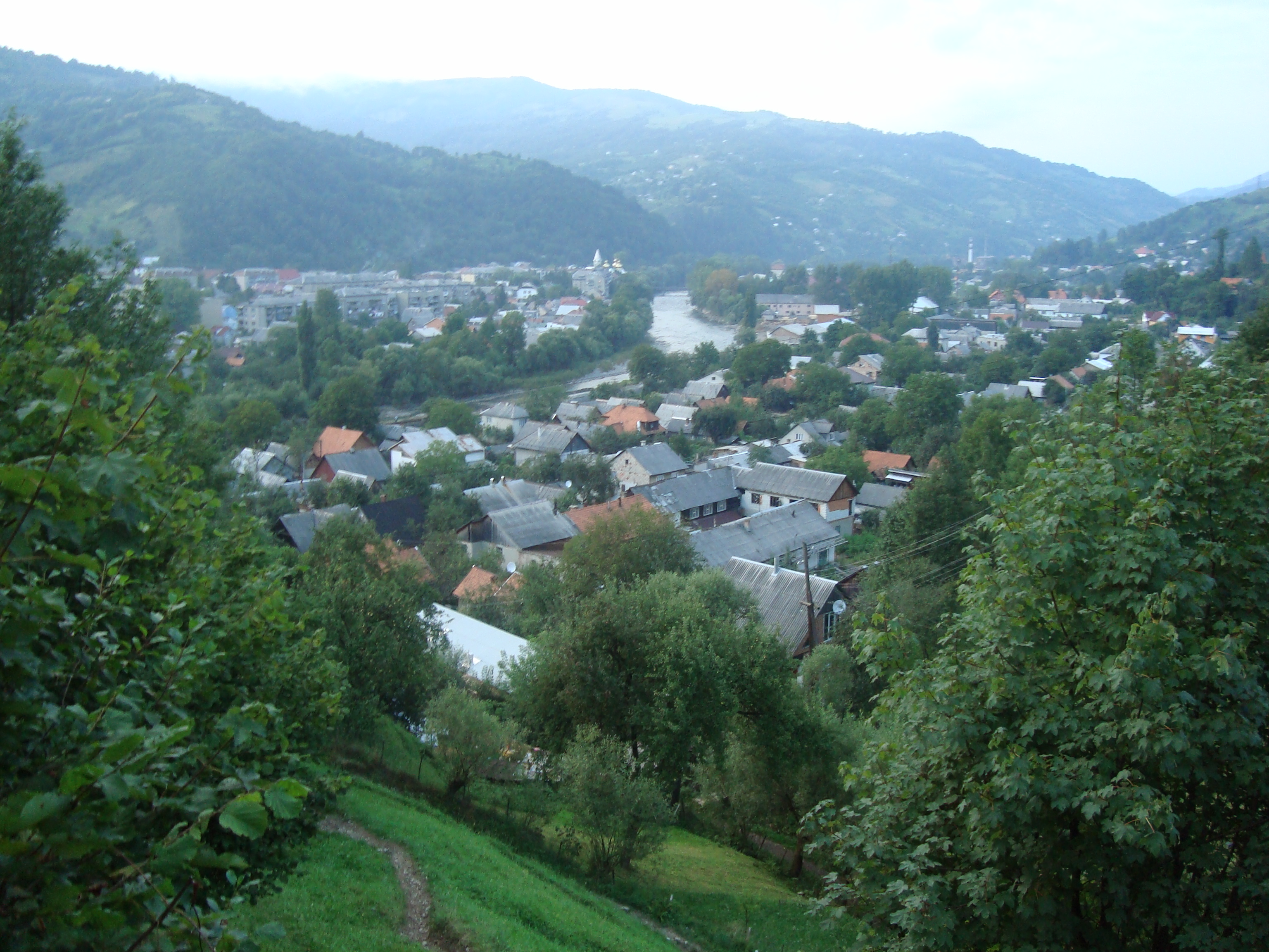 Вид на місто